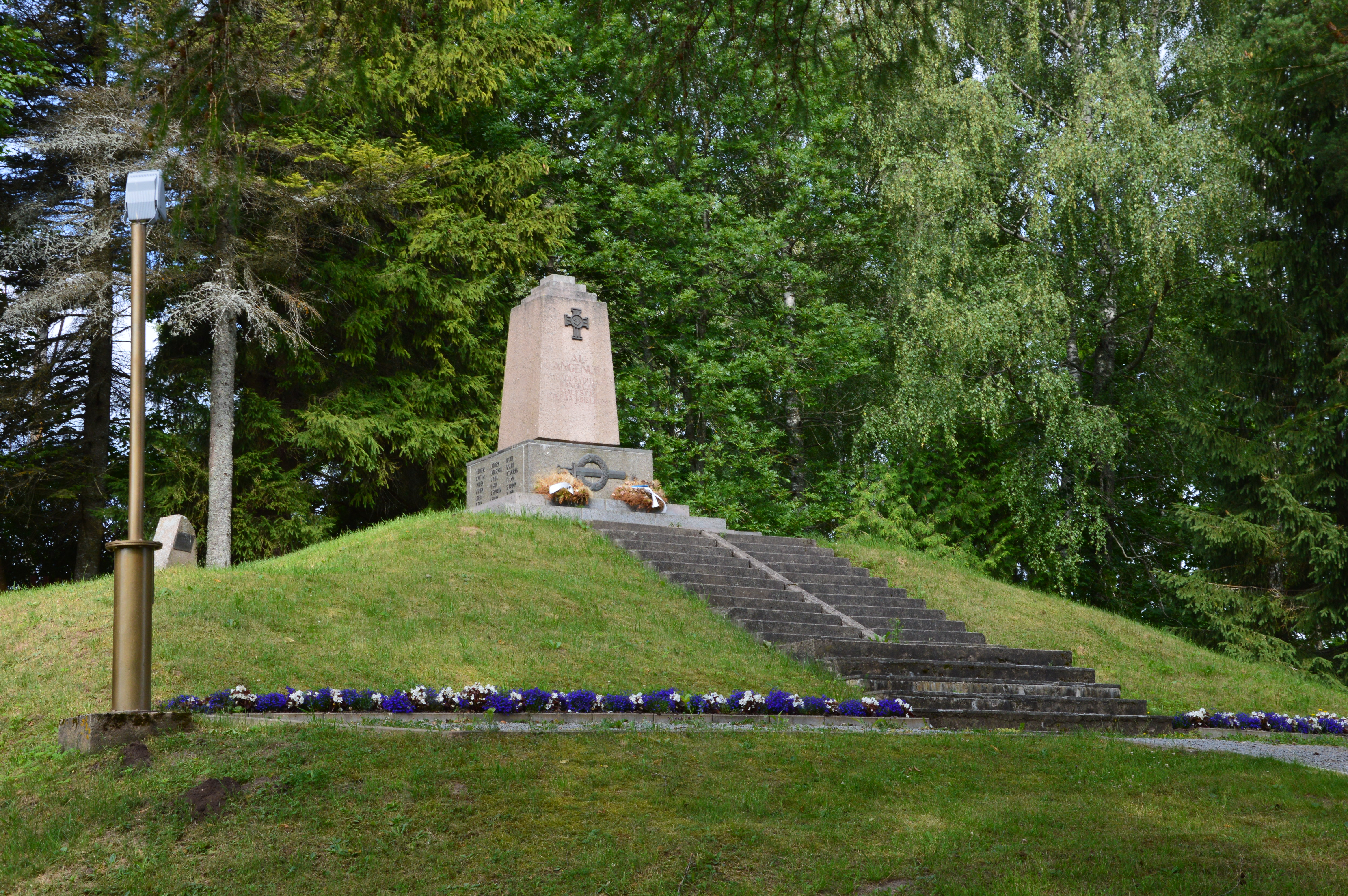 Otepää Vabadussõja mälestussammas